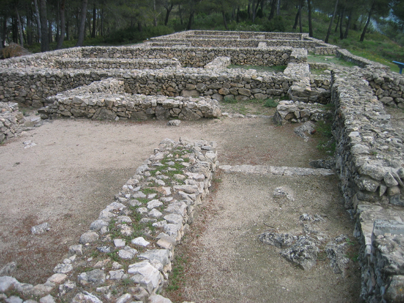 Sistema constructivo empleado en el poblado ibérico de la Bastida de les Alcusses.